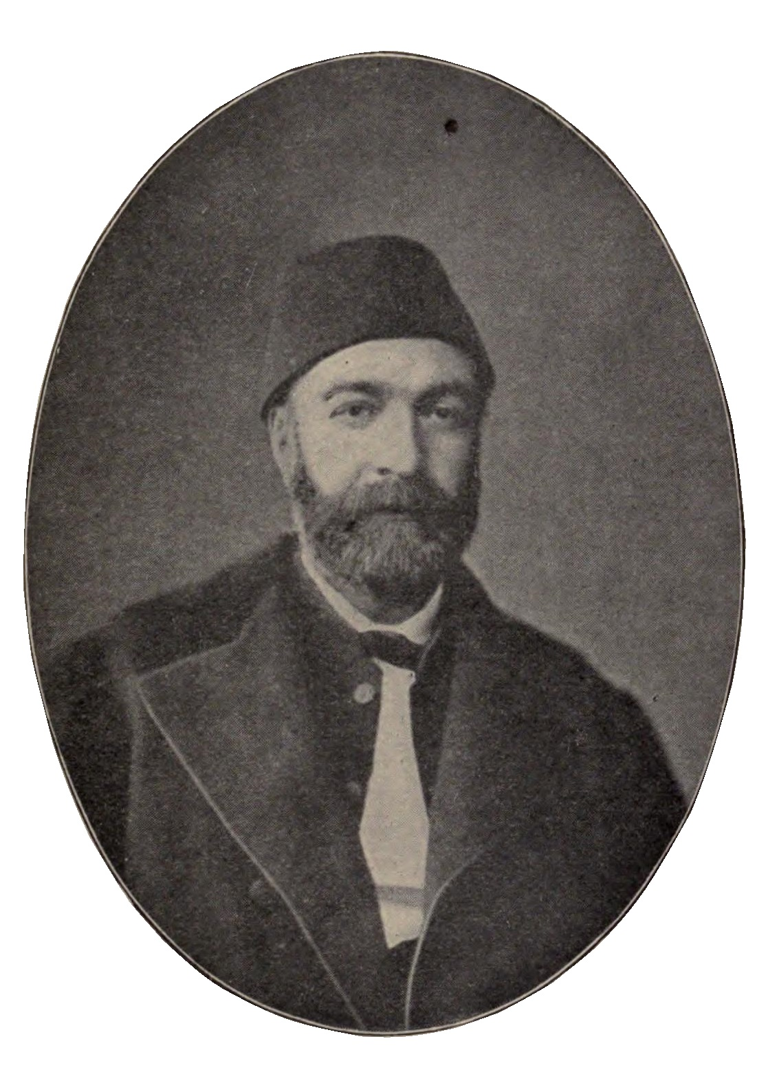 Ziya Paşa